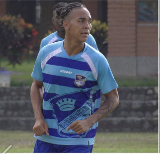 Jugadpr